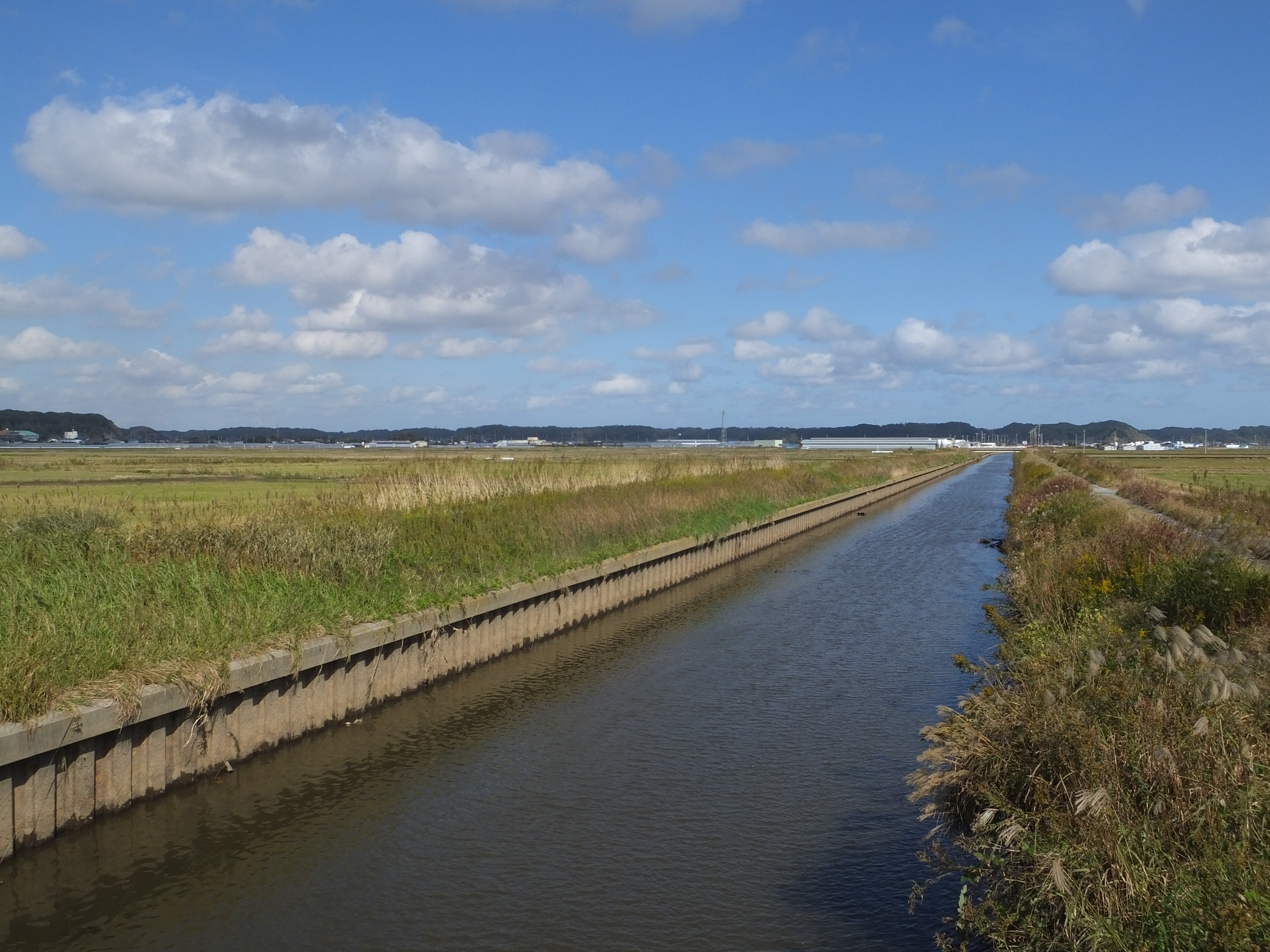 新川（関戸橋より上流方、千葉県旭市）